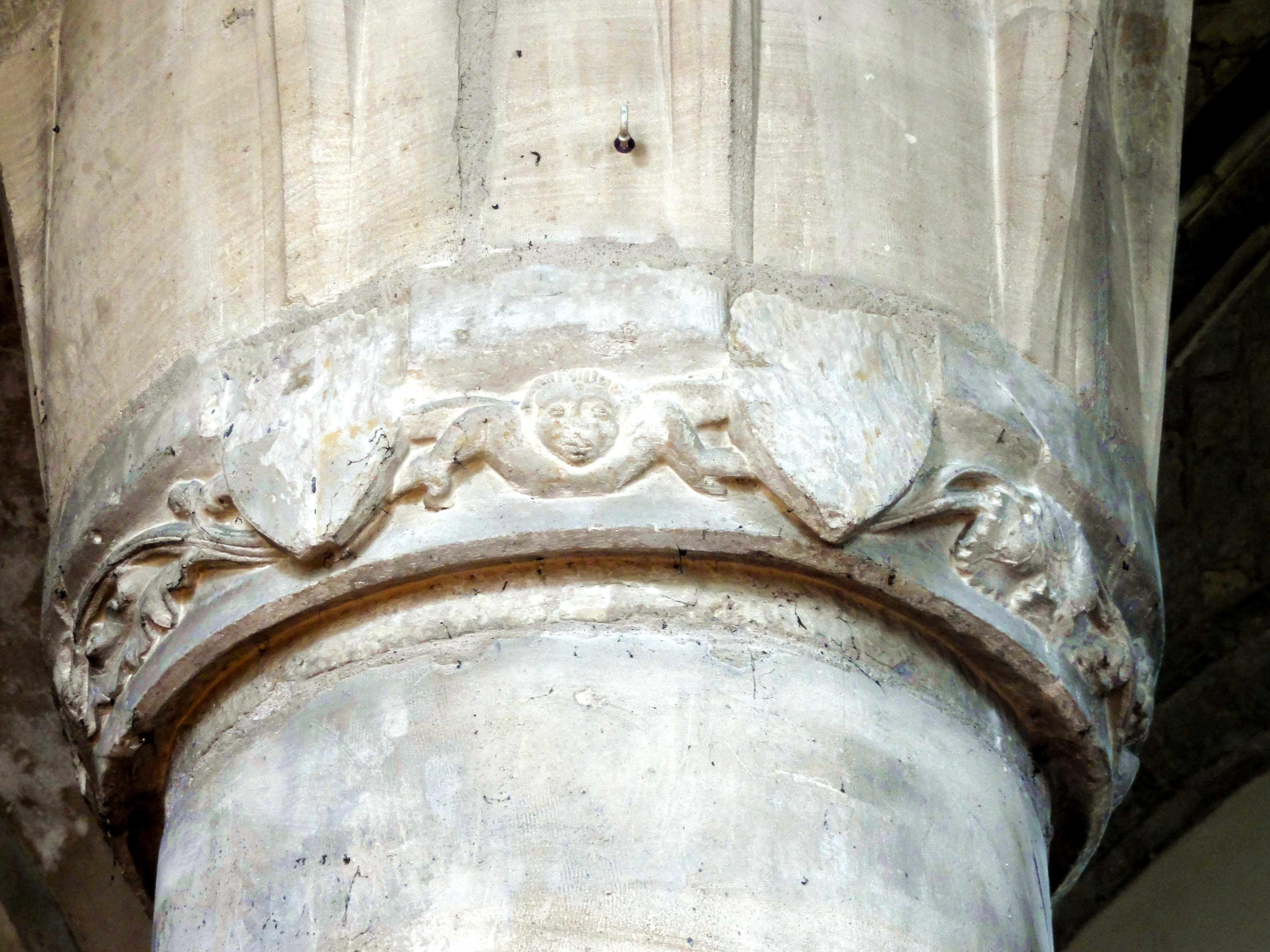 Chapiteau du pilier SE du clocher (3e pilier central de l'église).